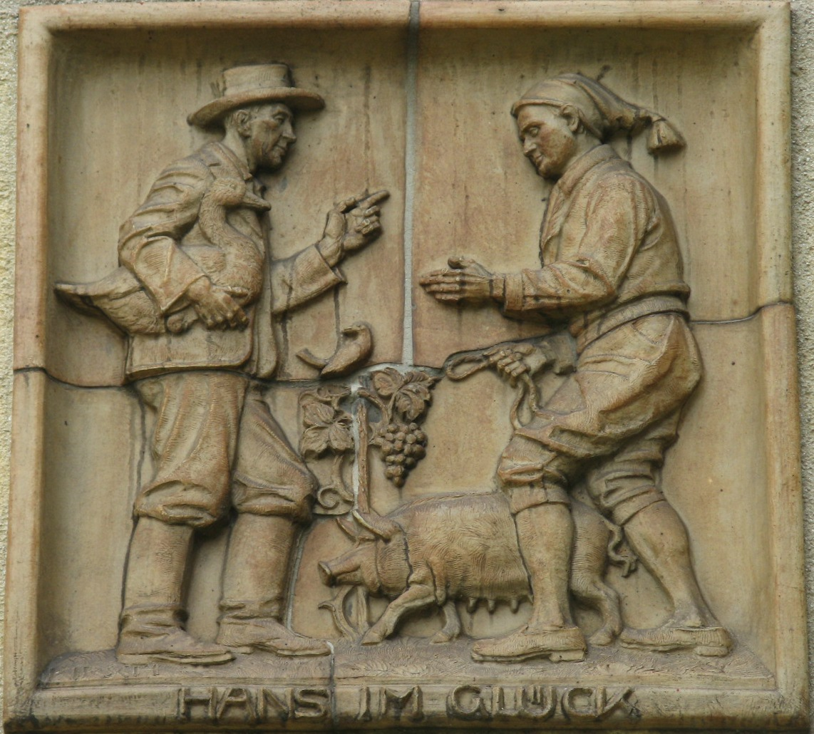 Hans im Glück, Terrakottarelief, Johann-Mithlinger-Siedlung, Raxstraße 7-27, Wien-Favoriten